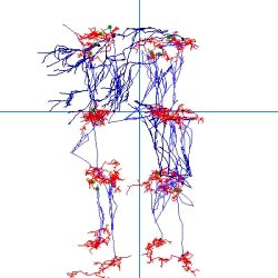 Simuliertes fraktales Neuriten-Wachstum am Beispiel eines Stickleiternervensystems. Zugehöriges Virtuelles Tierchen: 'Zenwurm'.